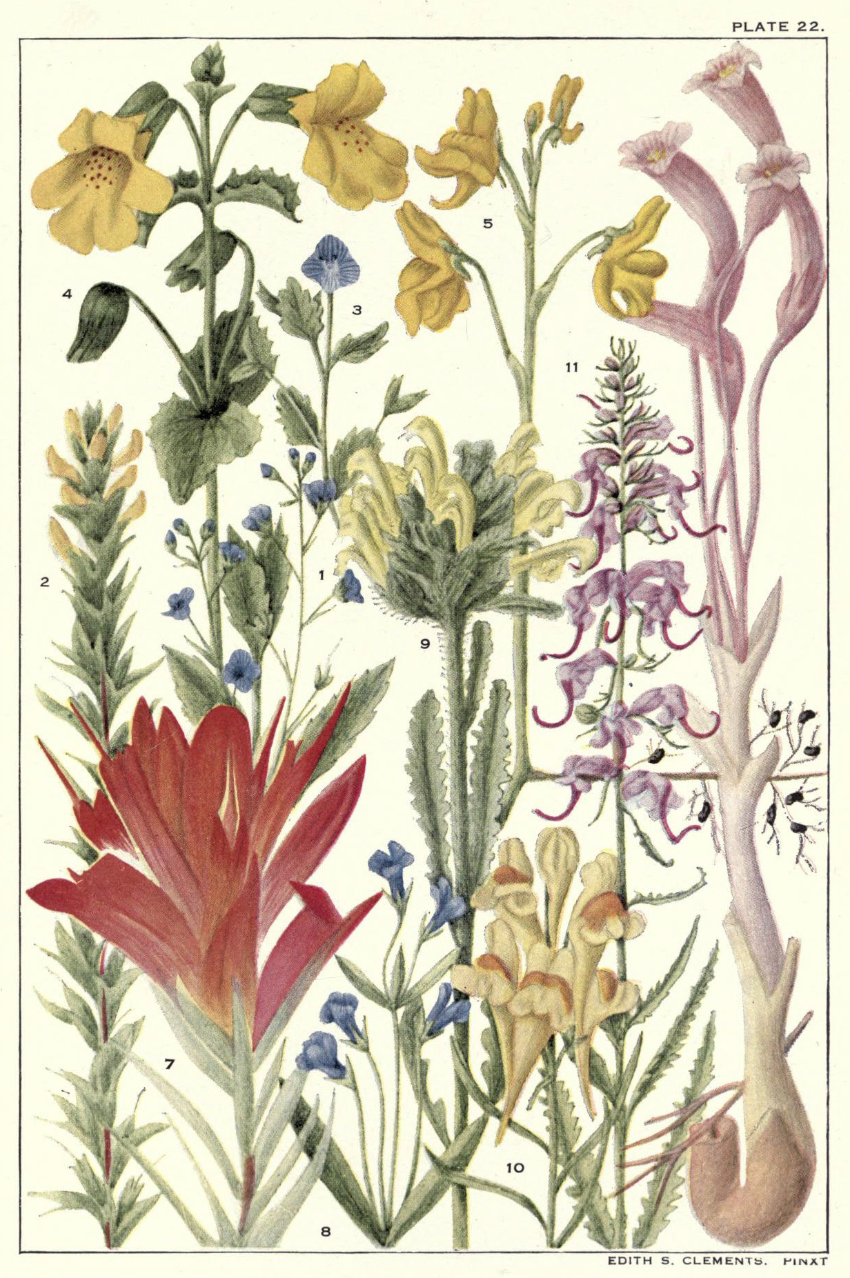 PLATE 22. Veronica americana Orthocarpus luteus Veronica buxbaumii = Veronica pectinata Mimulus langsdorffii Utricularia vulgaris Thalesia uniflora = Orobanche uniflora Castilleja miniata Collinsia parviflora Pedicularis canadensis Linaria vulgaris Elephantella groenlandica = Pedicularis groenlandica